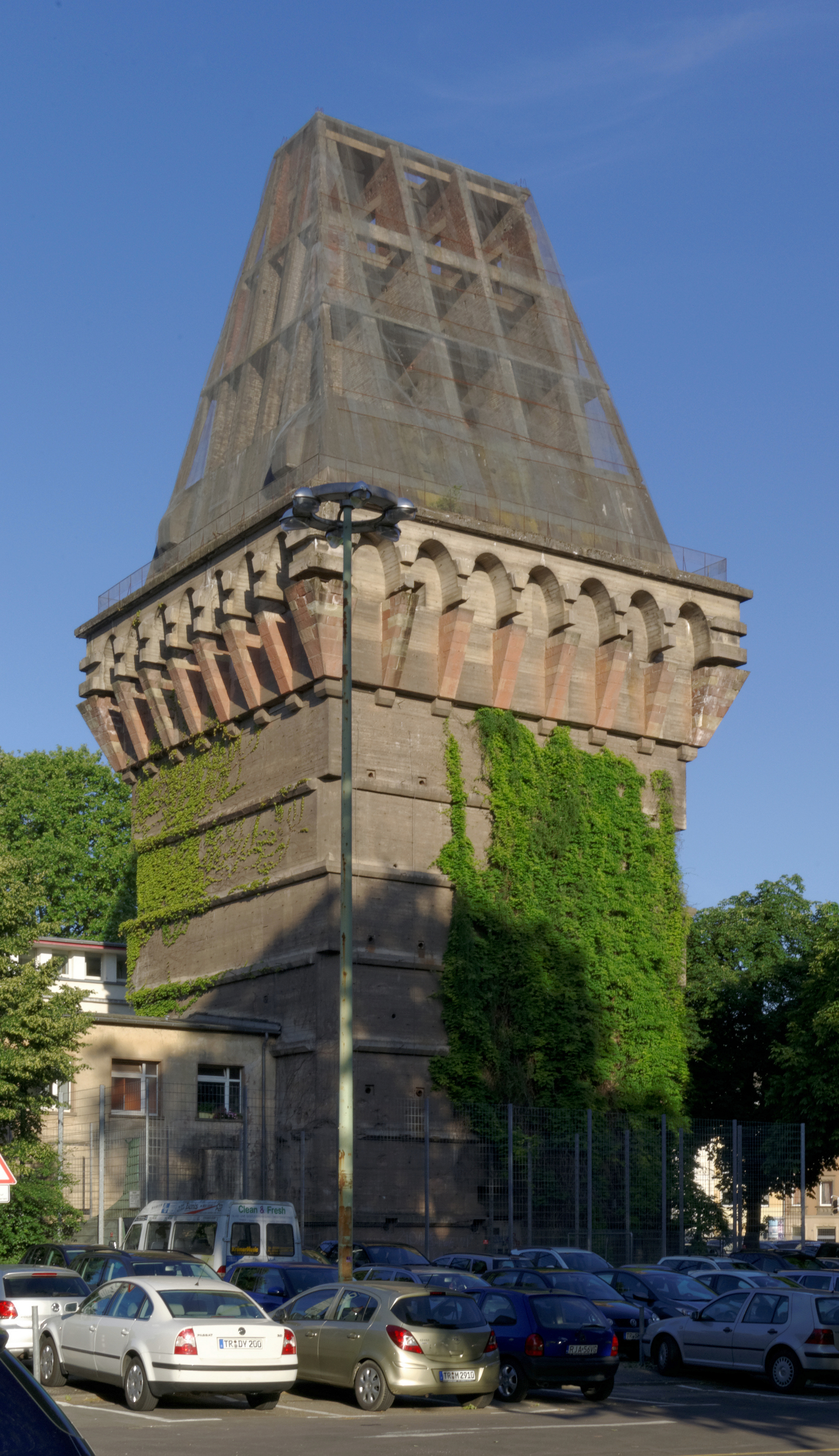 Trier, Hochbunker am Augustinerhof, neungeschossiger, im Dachbereich unvollendeter Stahlbetonturm mit anschließendem Flachbunker, beide zweigeschossig unterkellert, 1943